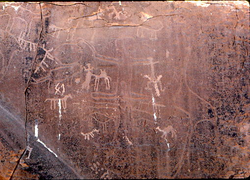 Gravure préhistorique du sud oranais, Gouiret bent Saloul, Algérie